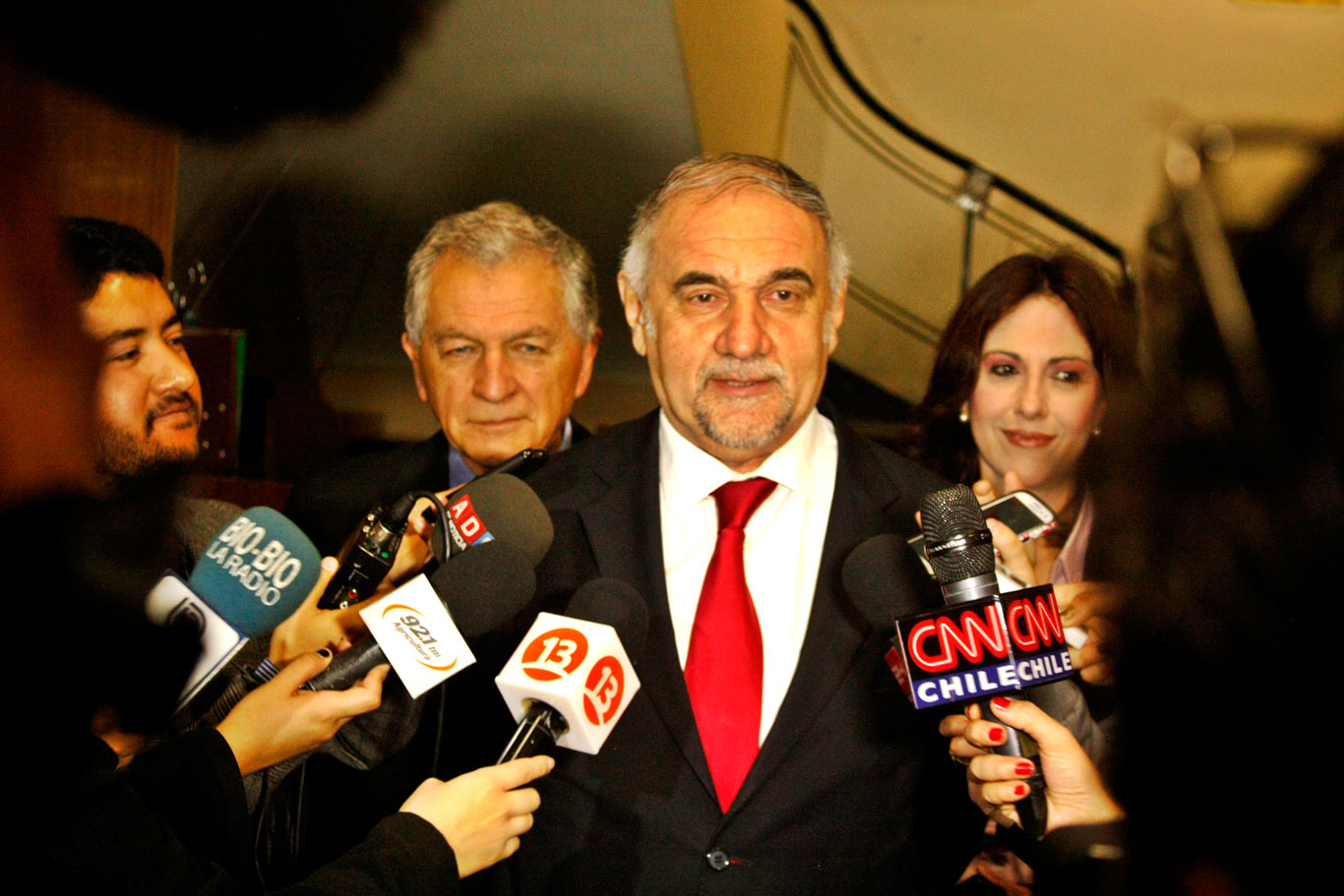 Conferencia de prensa realizada en el Servicio Electoral tras el sorteo de número de listas y letras para las elecciones 2013